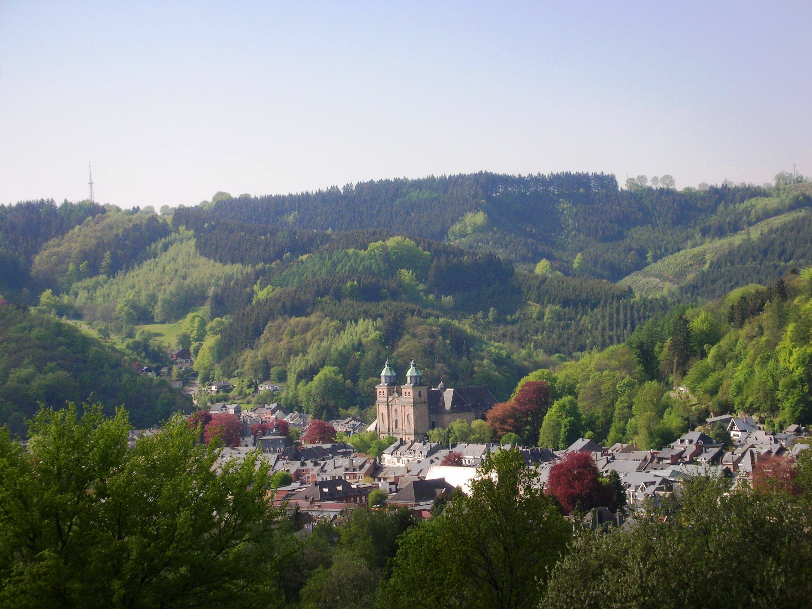 Photo prise de la Route de Floriheid